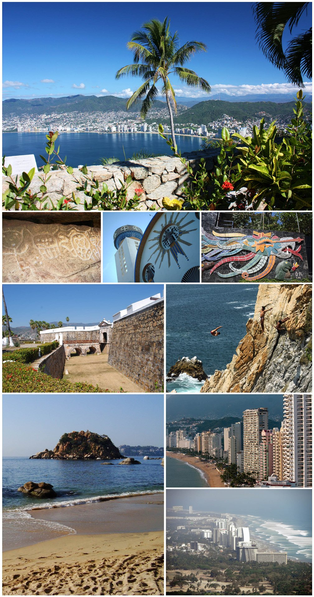 Acapulco Collage 2013.